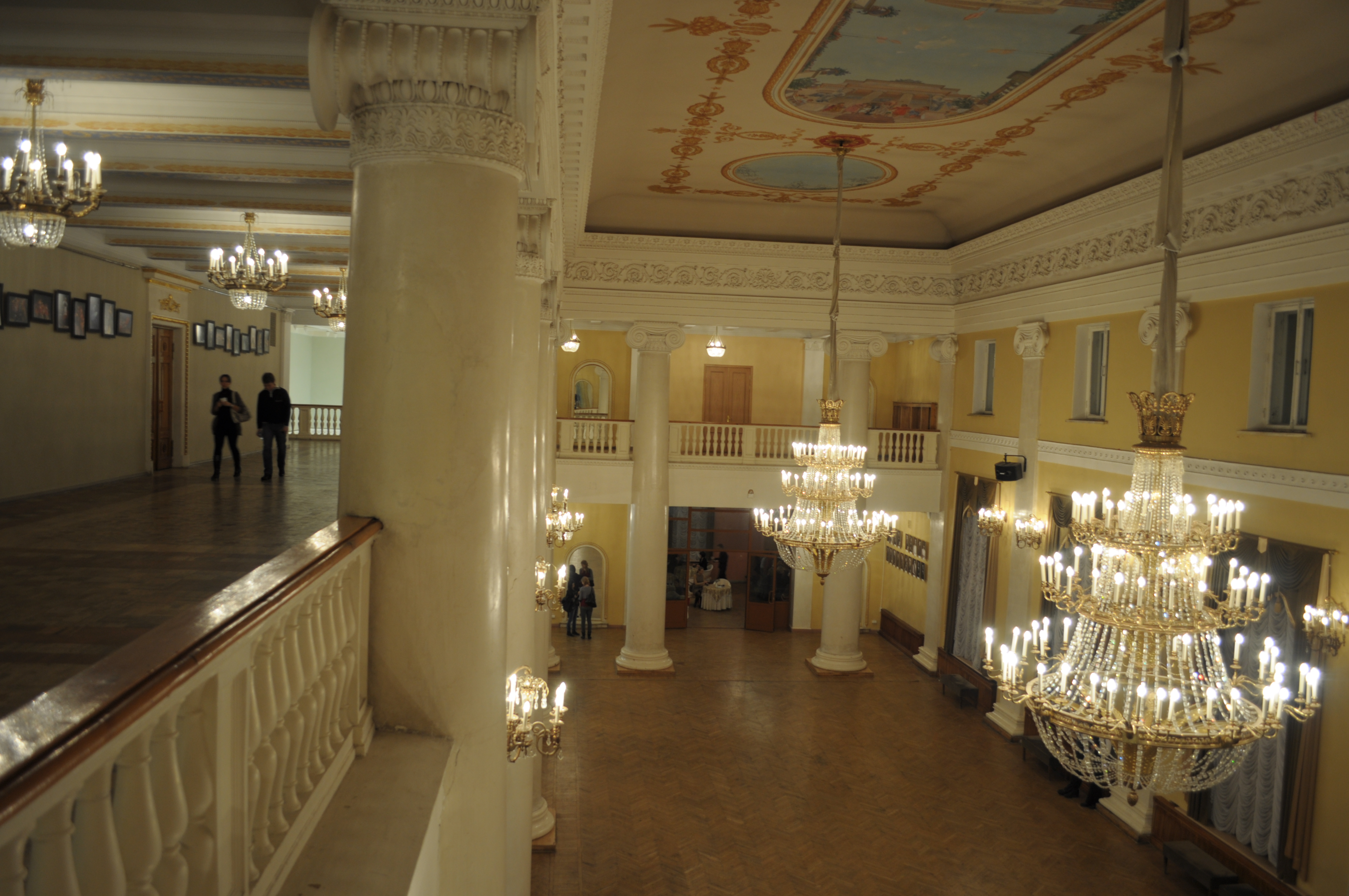 Холл. Здание театра оперы и балета им. м. и. глинки (Челябинская область, Челябинск, ярославского площадь, 1)